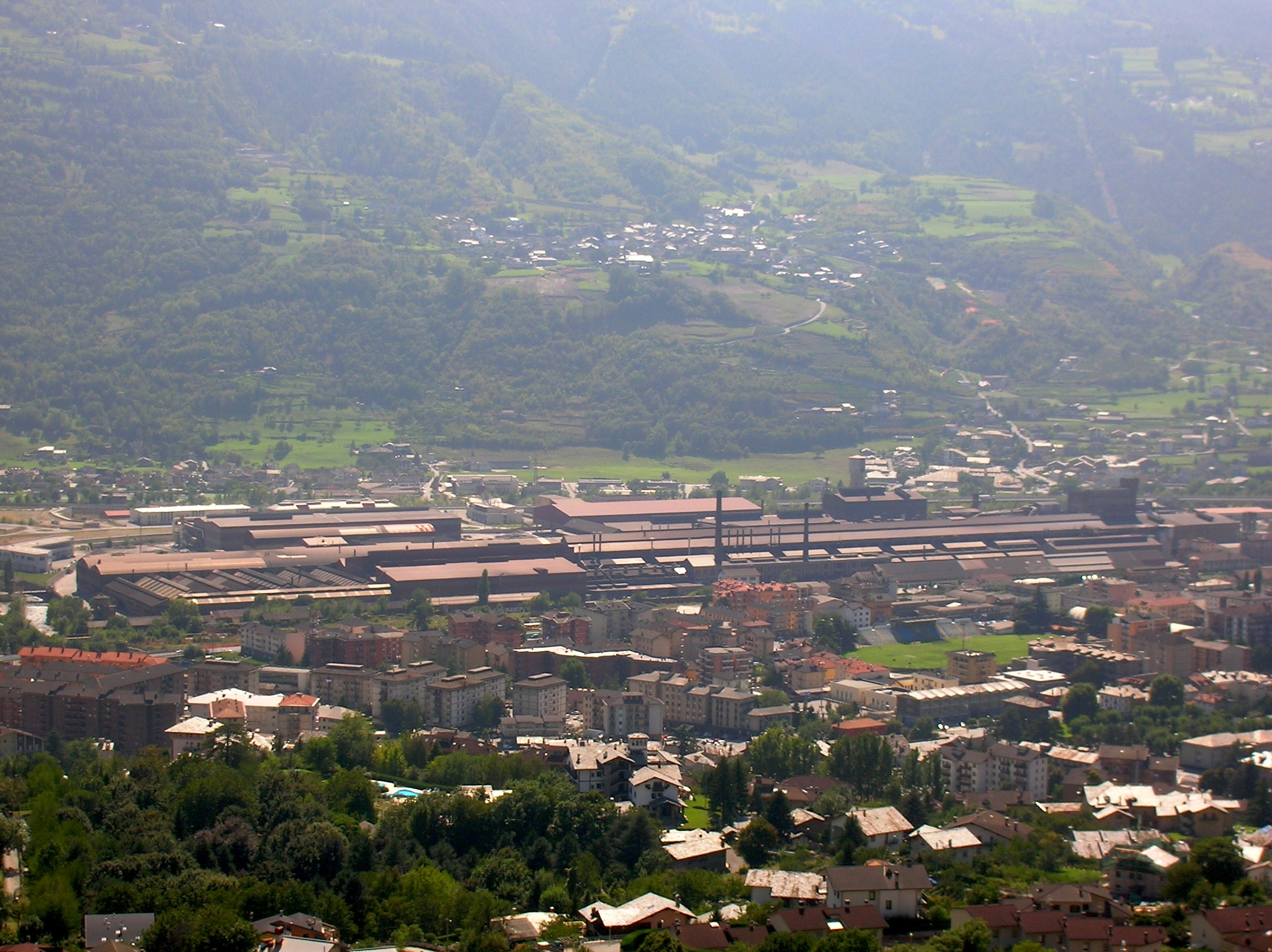 Panoramica su Azienda Cogne Acciai Speciali ad Aosta, Valle d'Aosta, Italia. Vista dalla Riserva naturale Tzatelet.